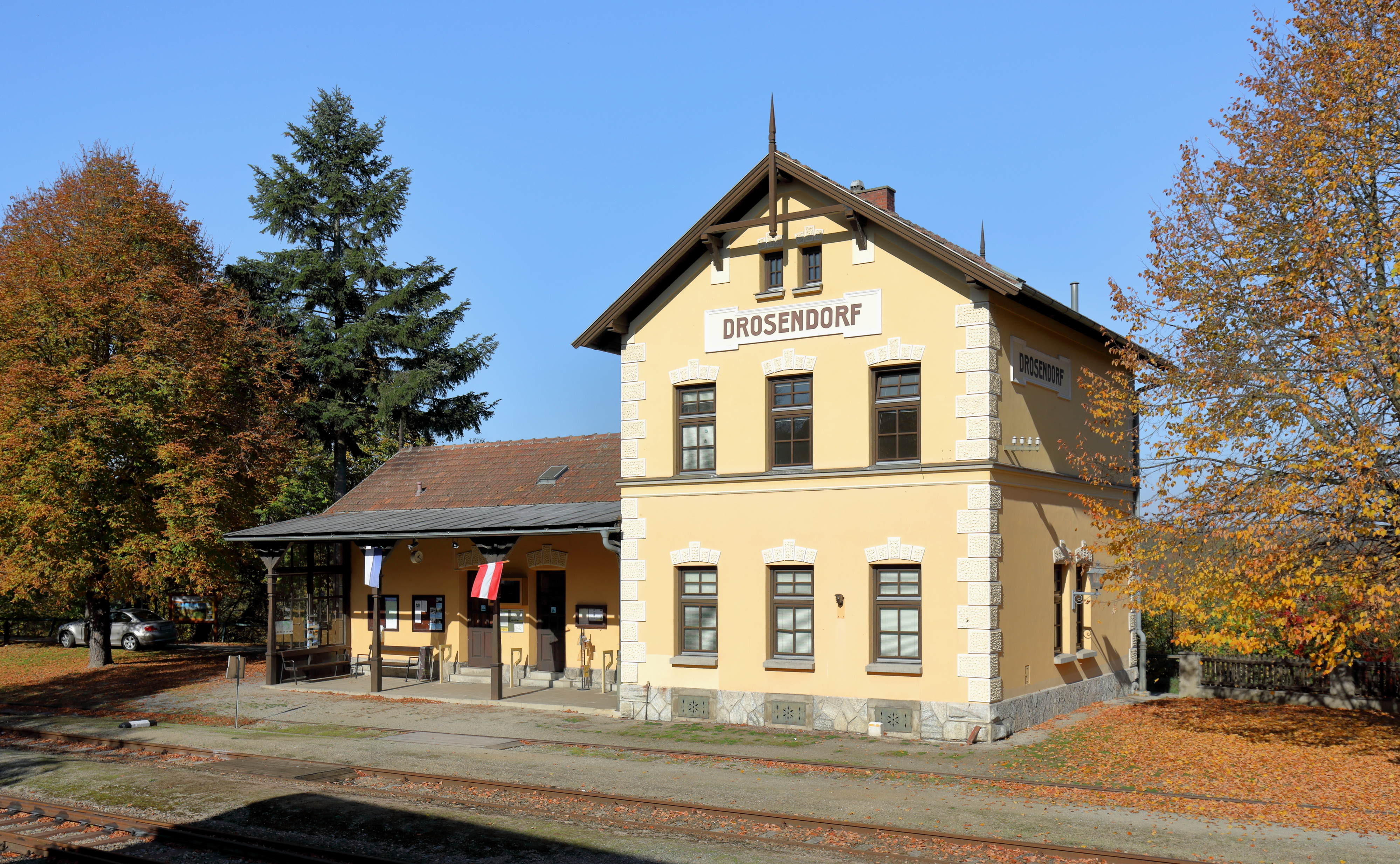 Der im Heimatstil errichtete und denkmalgeschützte Bahnhof der Lokalbahn Retz–Drosendorf in Drosendorf, ein Ortsteil der niederösterreichischen Stadt Drosendorf-Zissersdorf. Die Strecke wurde ab Okt. 1908 errichtet und nahm am 21. Oktober 1910 den planmäßigen Betrieb auf.